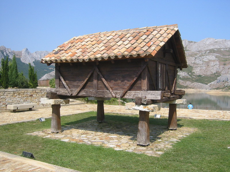 Hórreo en Riaño (provincia de León), España Fotografía de Usuario:Rapomon realizada con cámara Canon IXUS v2 y cedida a la Wikipedia